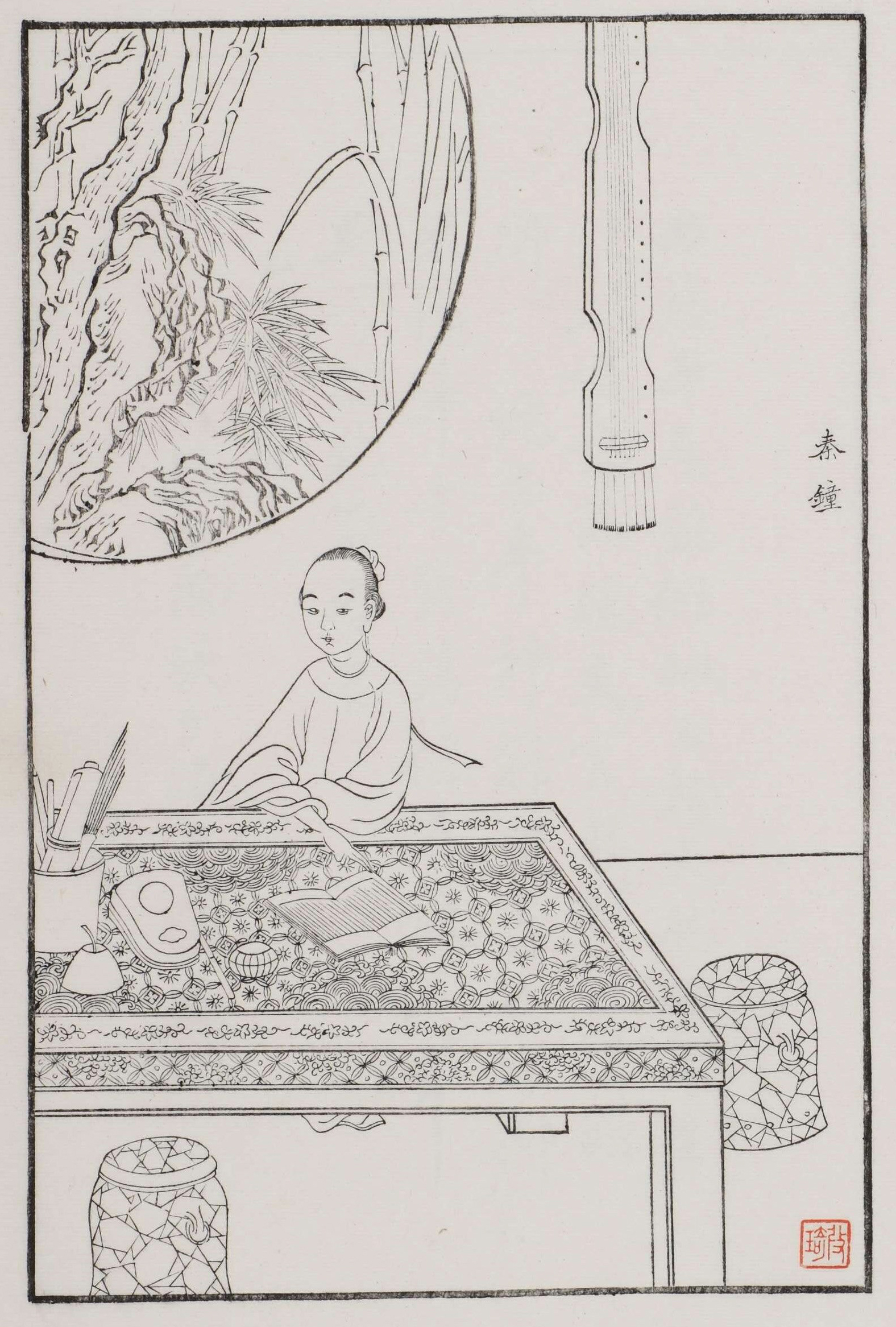 Qin Cloche d'Or